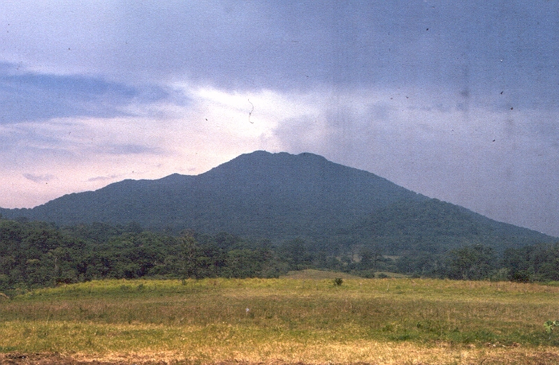 VOLCAN DE SAN MARTIN TUXTLA